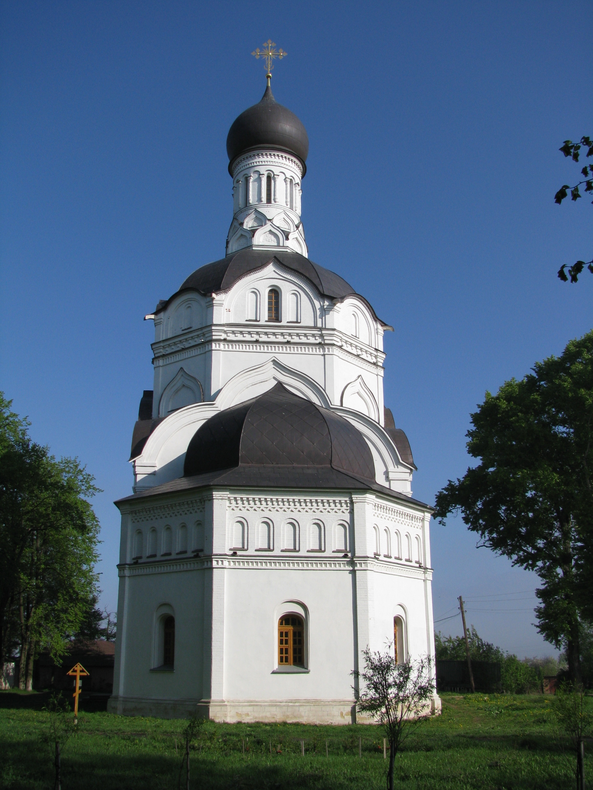 Church in Lipitsy village, Golovkins' country estate (Serpukhov District, Moscow Region)/Храм Благовещения Пресвятой Богородицы в Липицах (Серпуховский район Московской области)